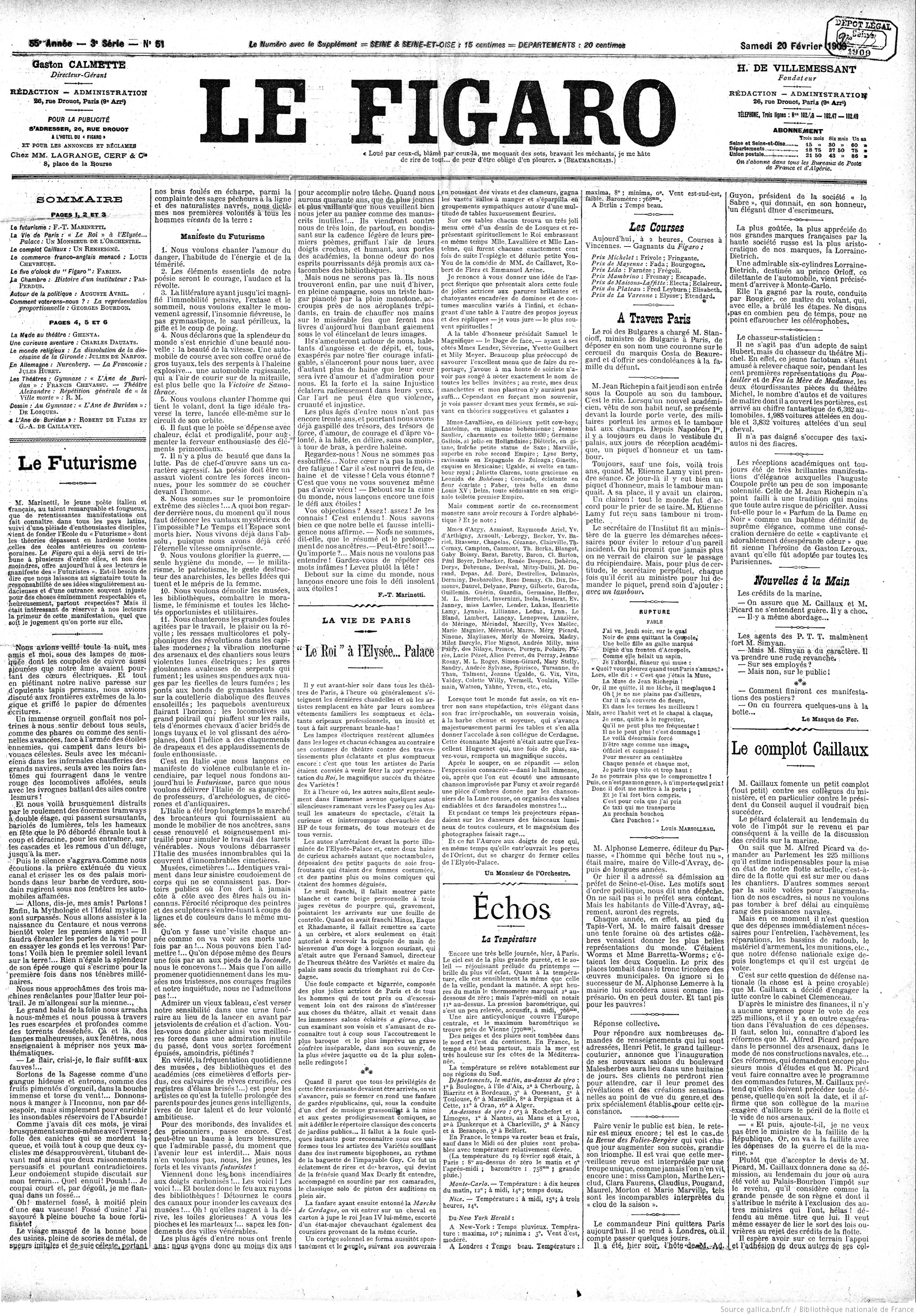 Titre : Figaro : journal non politique Éditeur : Figaro (Paris) Date d'édition : 1909-02-20 Contributeur : Villemessant, Jean Hippolyte Auguste Delaunay de (1810-1879). Directeur de publication Contributeur : Jouvin, Benoît. Directeur de publication Type : texte Type : publication en série imprimée Langue : Français Langue : language.label.français Format : application/jpg Description : 1909/02/20 (Numéro 51). Description : Appartient à l’ensemble documentaire : Pam1 Droits : domaine public Identifiant : ark:/12148/bpt6k2883730 Source : Bibliothèque nationale de France Relation : Relation : Provenance : Bibliothèque nationale de France Date de mise en ligne : 15/10/2007 page 1